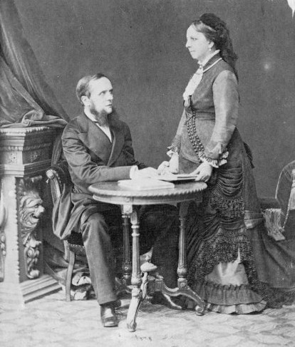 Алексей Иванович Мусин-Пушкин (1825—1879) с женой Любовью Александровной, урож. Кушелева-Безбородко (1833—1917)